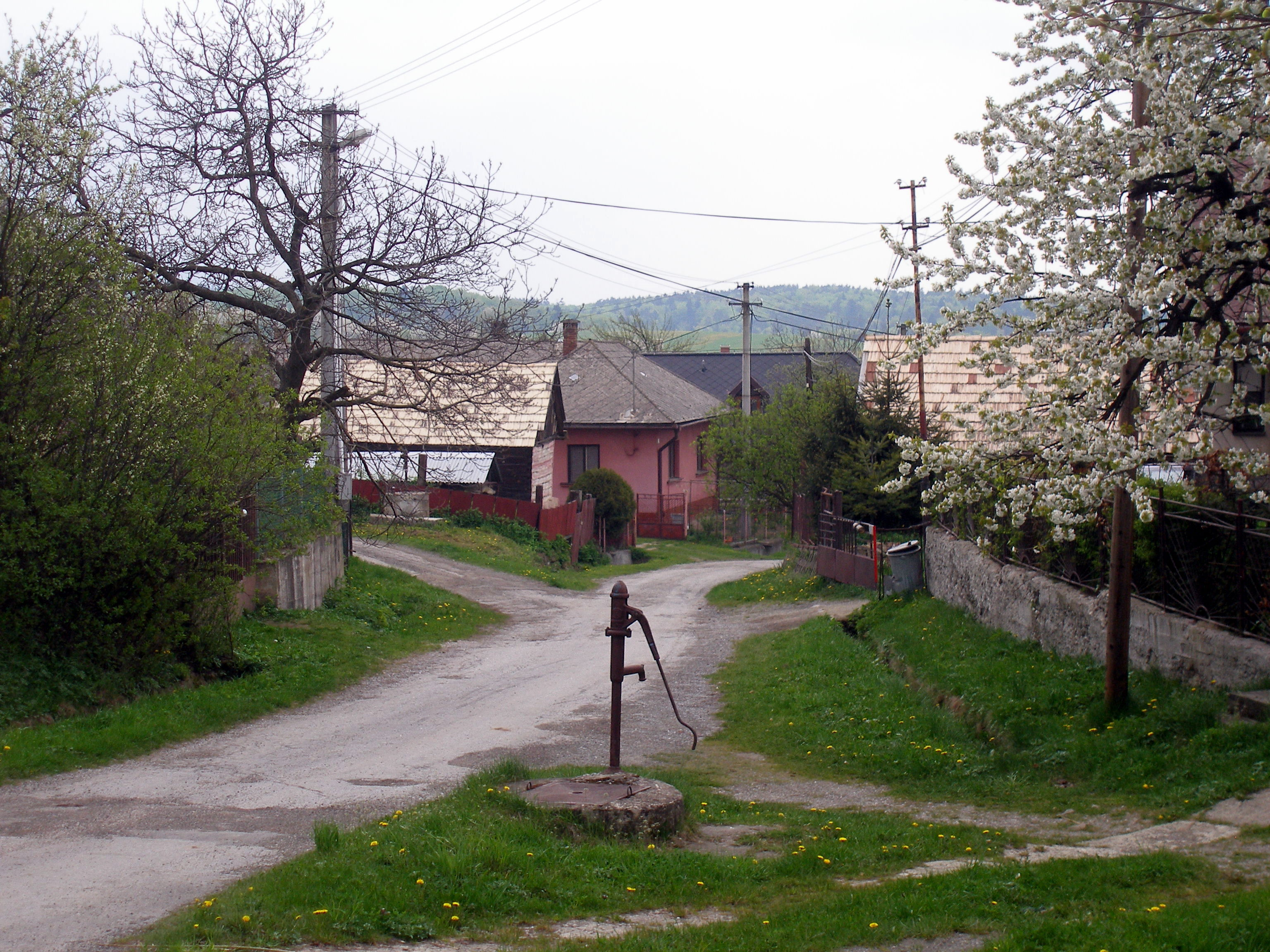 Obec Geraltov okres Prešov región Šariš